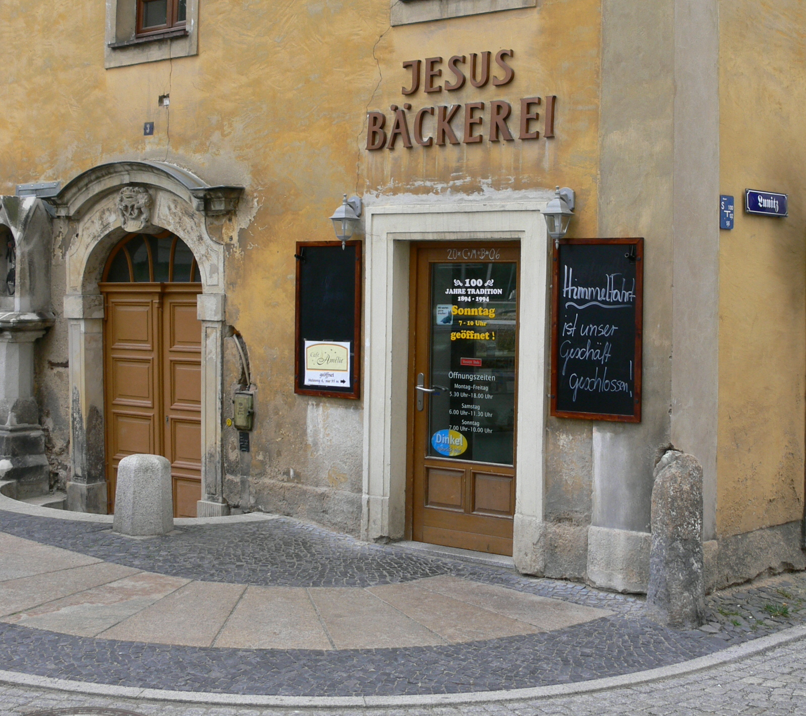 Görlitz, Jesusbäckerei (wg. Himmelfahrt verständlicherweise geschlossen)